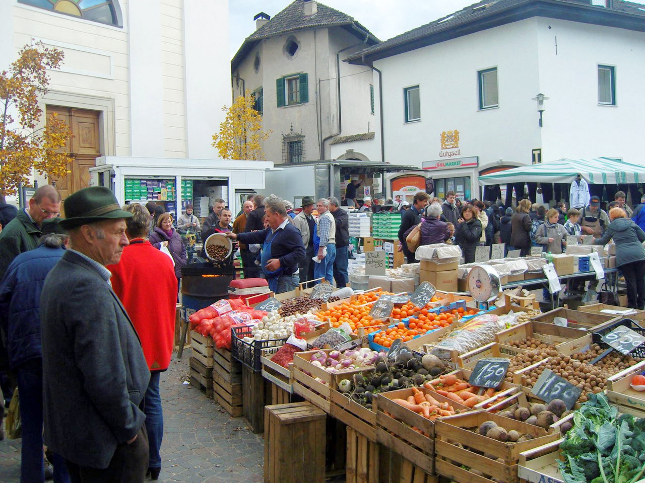 Martinimarkt in Girlan am Dorfplatz: im Vordergrund ein Bauernstand (Sulznerhof von Unterinn) mit Obst und Gemüse und den obligatorischen Kastanien ("Köstn")